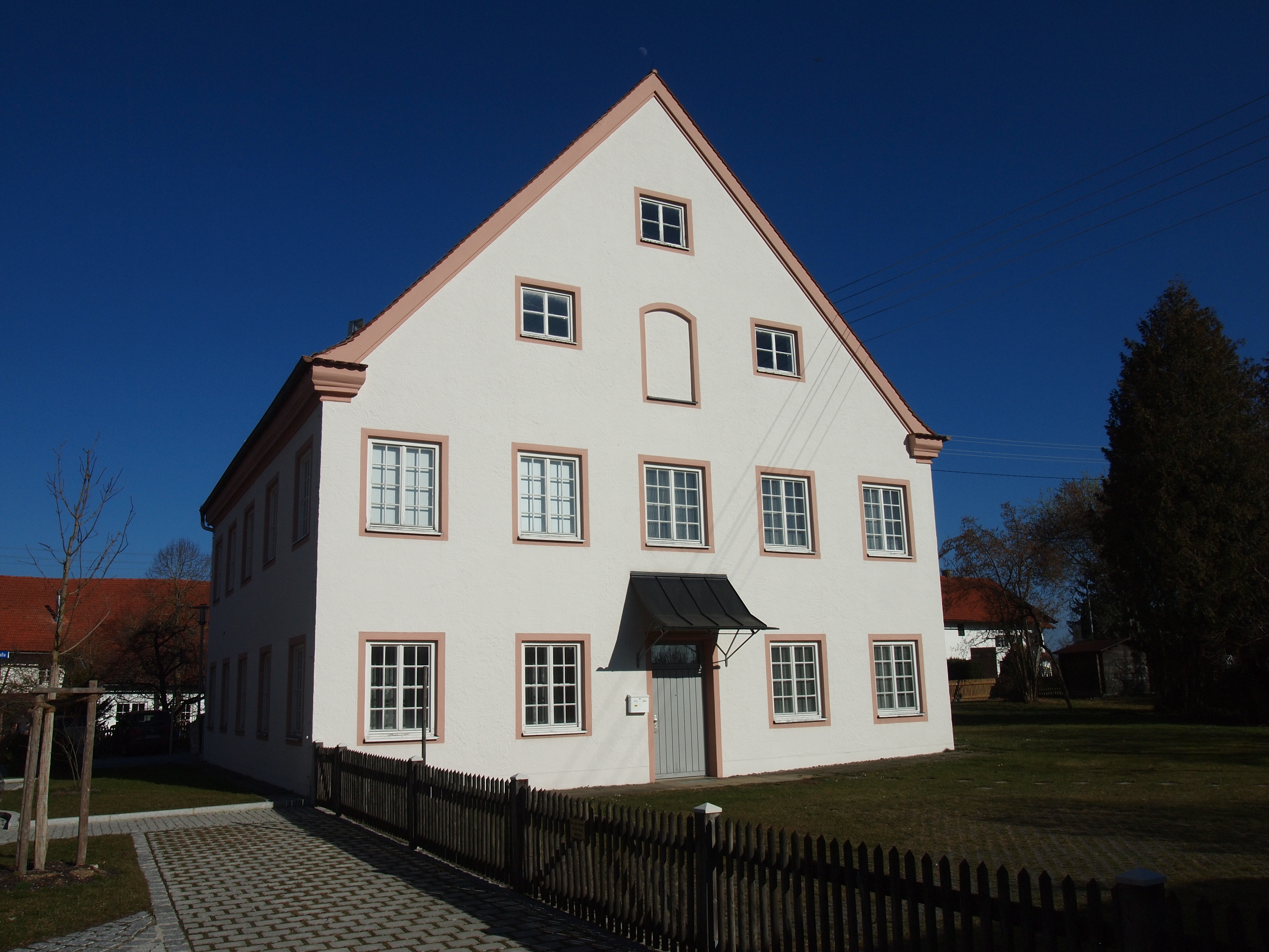 Schmiedberg 1, Stadl, Gemeinde Vilgertshofen. Pfarrhaus